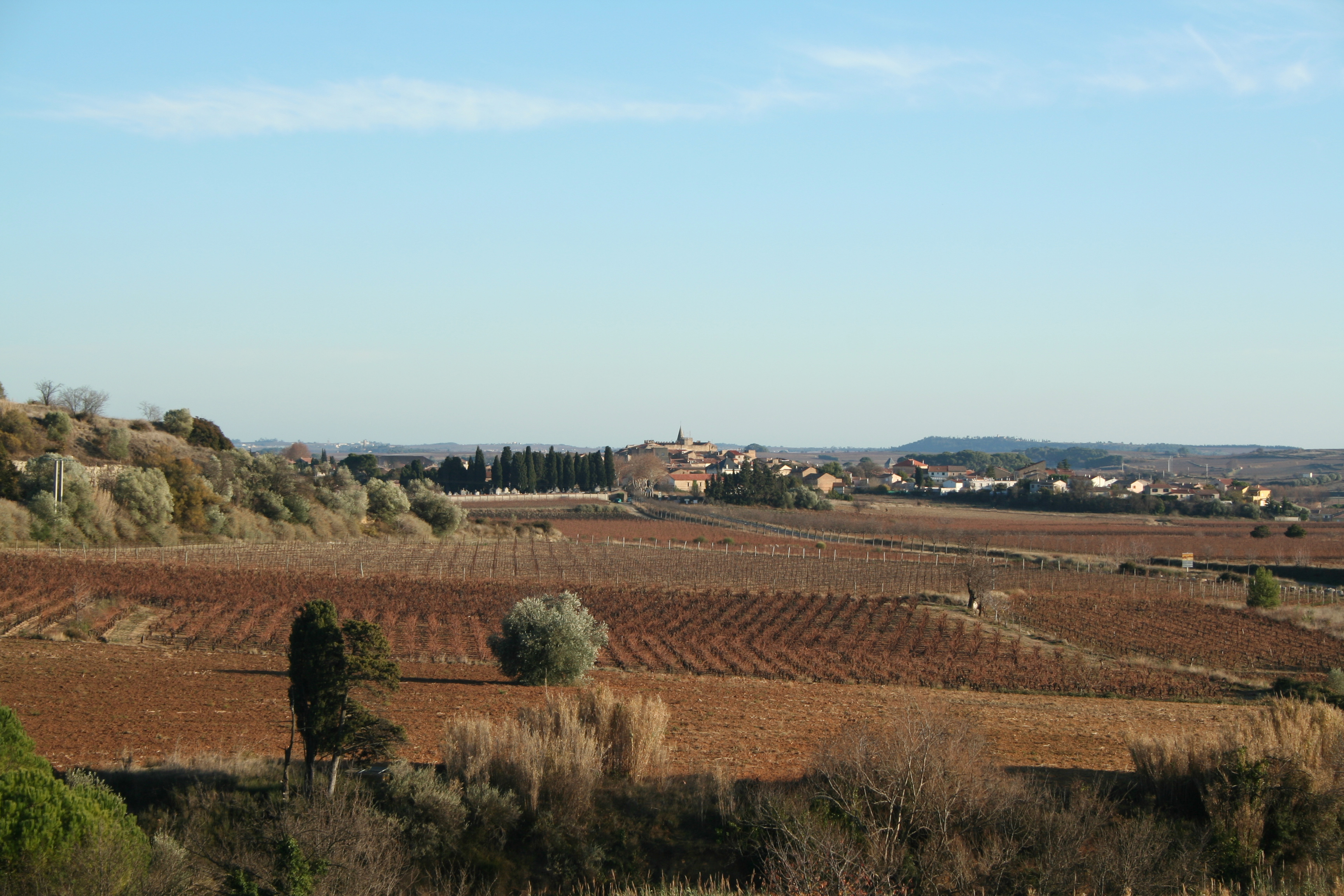 Puisserguier (Hérault) - vue générale.